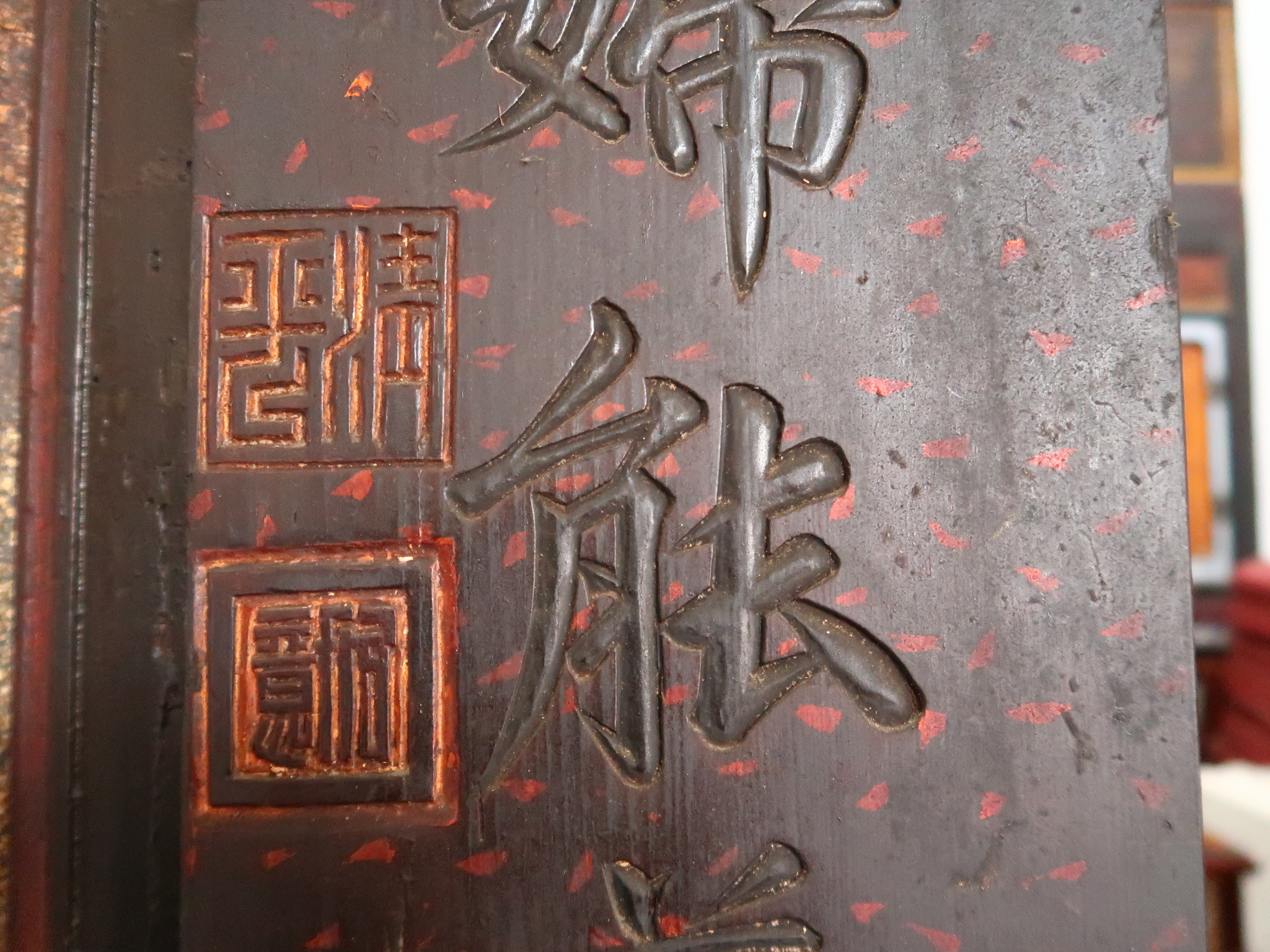 上聯：「聖柏操凜松貞慰夫乃繫人倫重」下聯：「愛妻風經苦雨為婦能兼子職修。」 日治時期澎湖廳稅檢吏鄭子清題（媽宮舉人鄭步蟾三子）